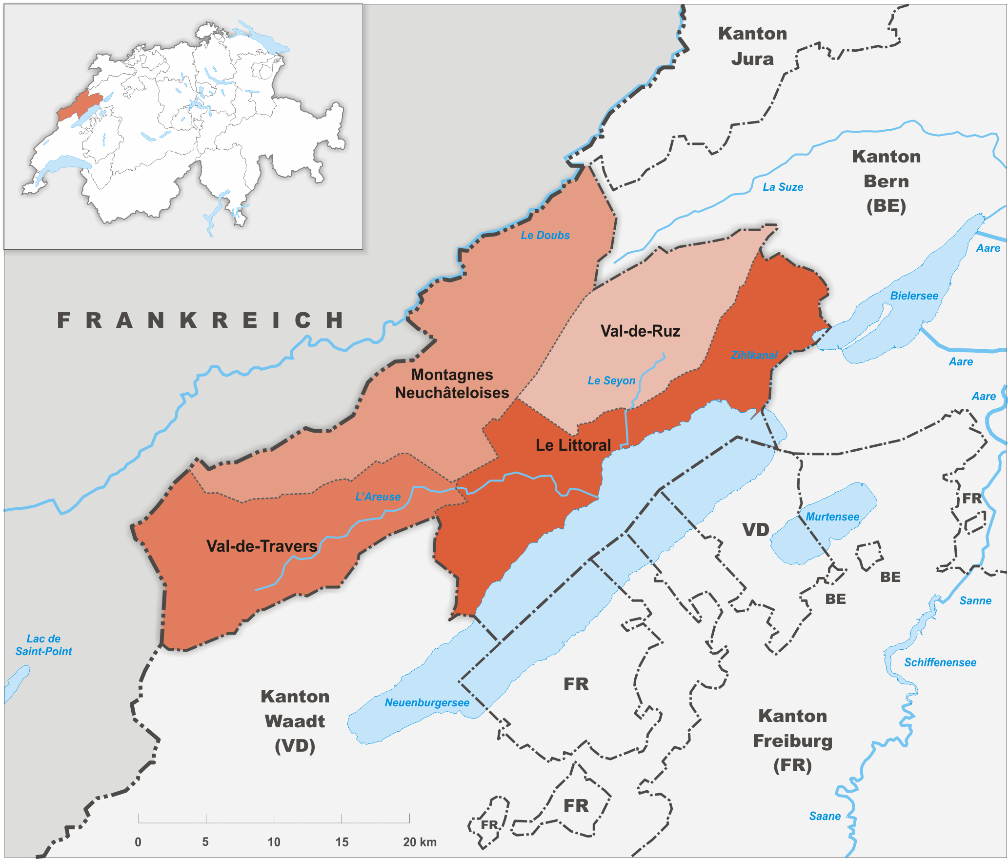 Regionen des Kanton Neuenburg